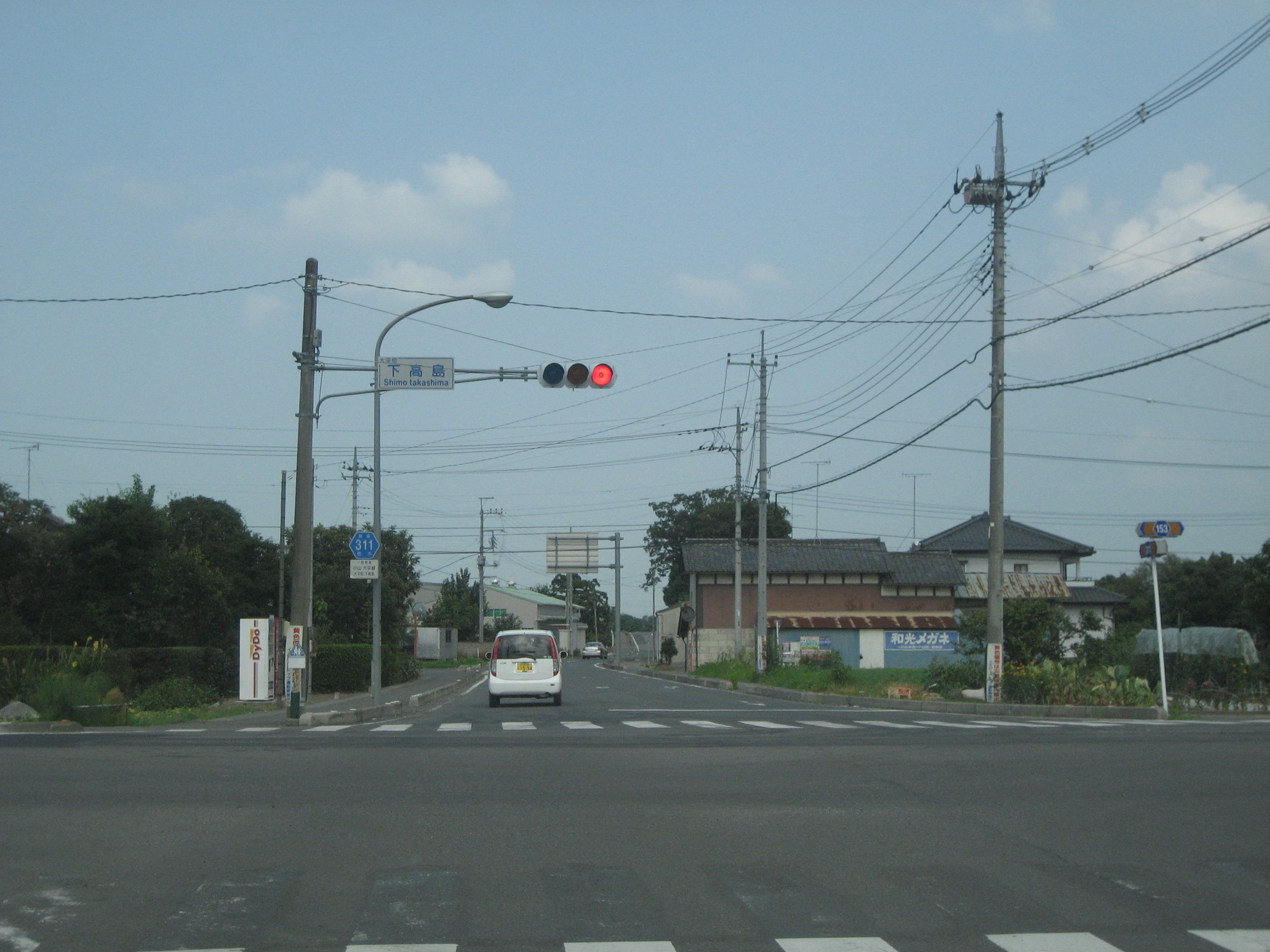 栃木県道311号線小山市内